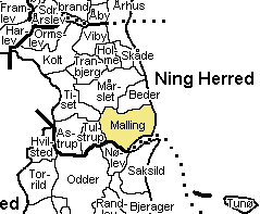 Kort der viser Malling Sogn, Ning Herred, Århus Amt, Denmark.